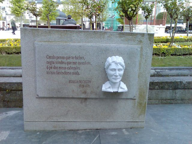 Versos de Follas Novas de Rosalía de Castro nun monumento en Lugo